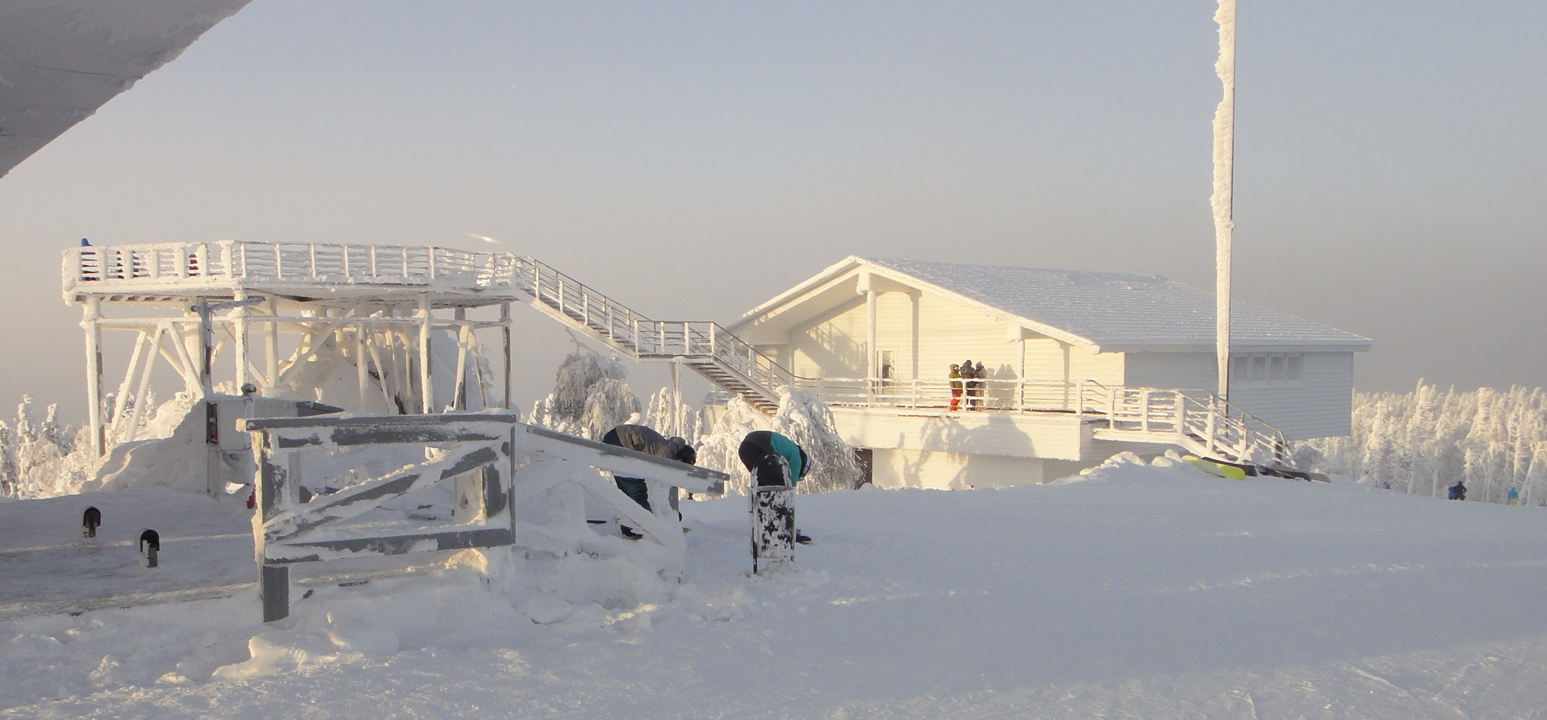 ГЛК Гора белая, Вид на смотровую площадку